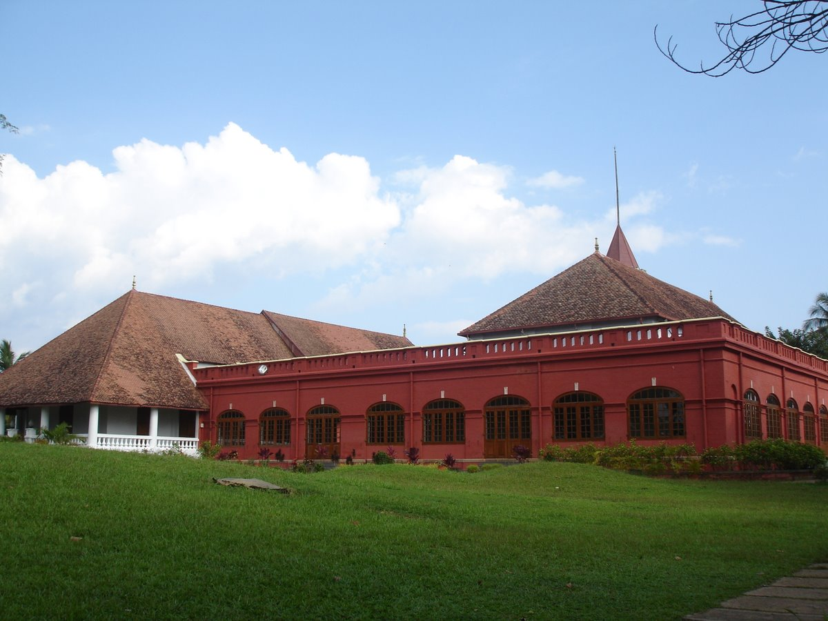 Kanakakkunnu Palace